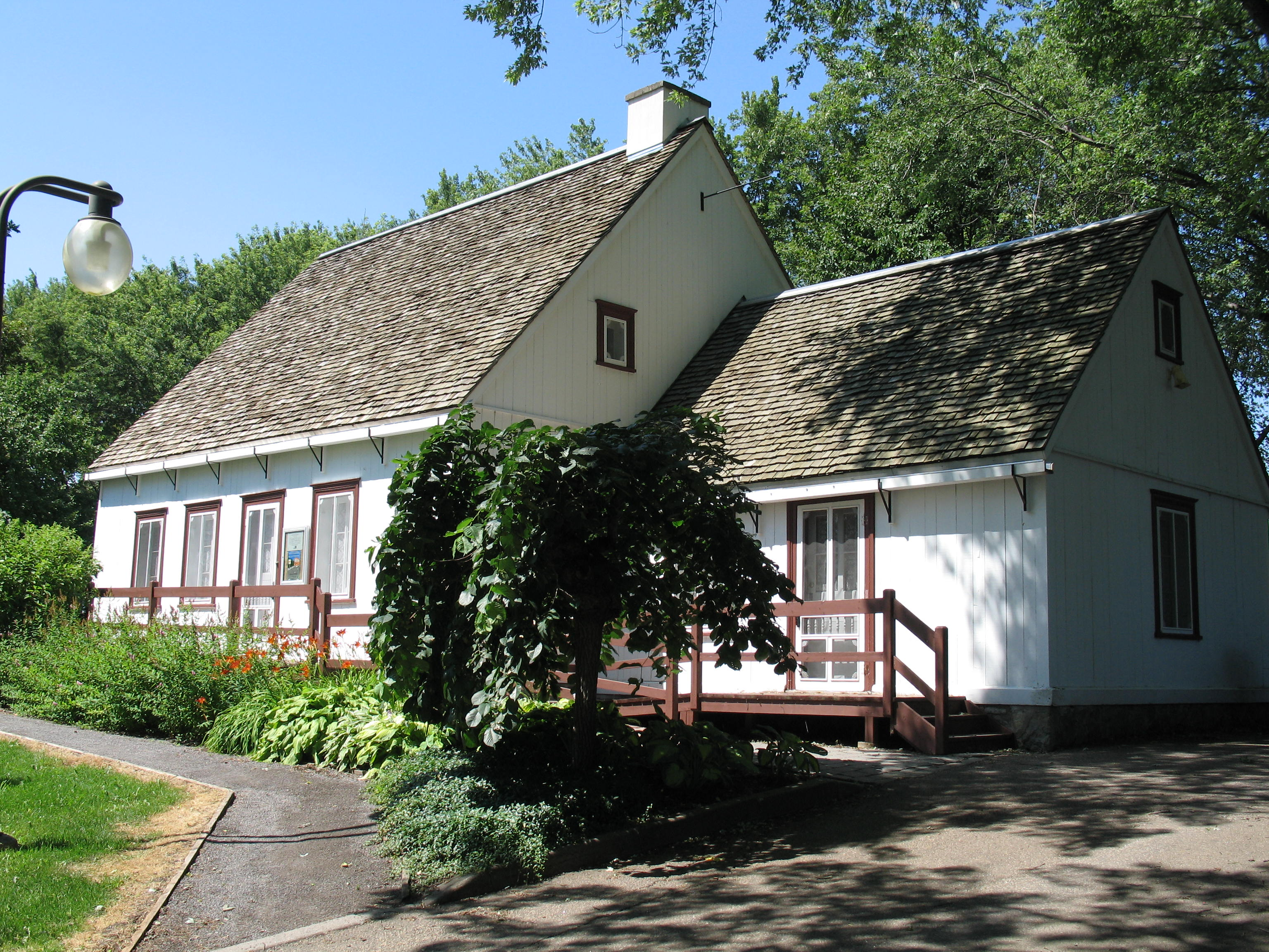 Située dans le quartier historique du Trait-Carré de l'arrondissement Charlesbourg de la ville de Québec, la maison Ephraïm-Bédard est une maison villageoise constuite en 1828. La maison est la propriété de la Ville de Québec qui a confié l'animation aux bénévoles de la Société historique de Charlesbourg.